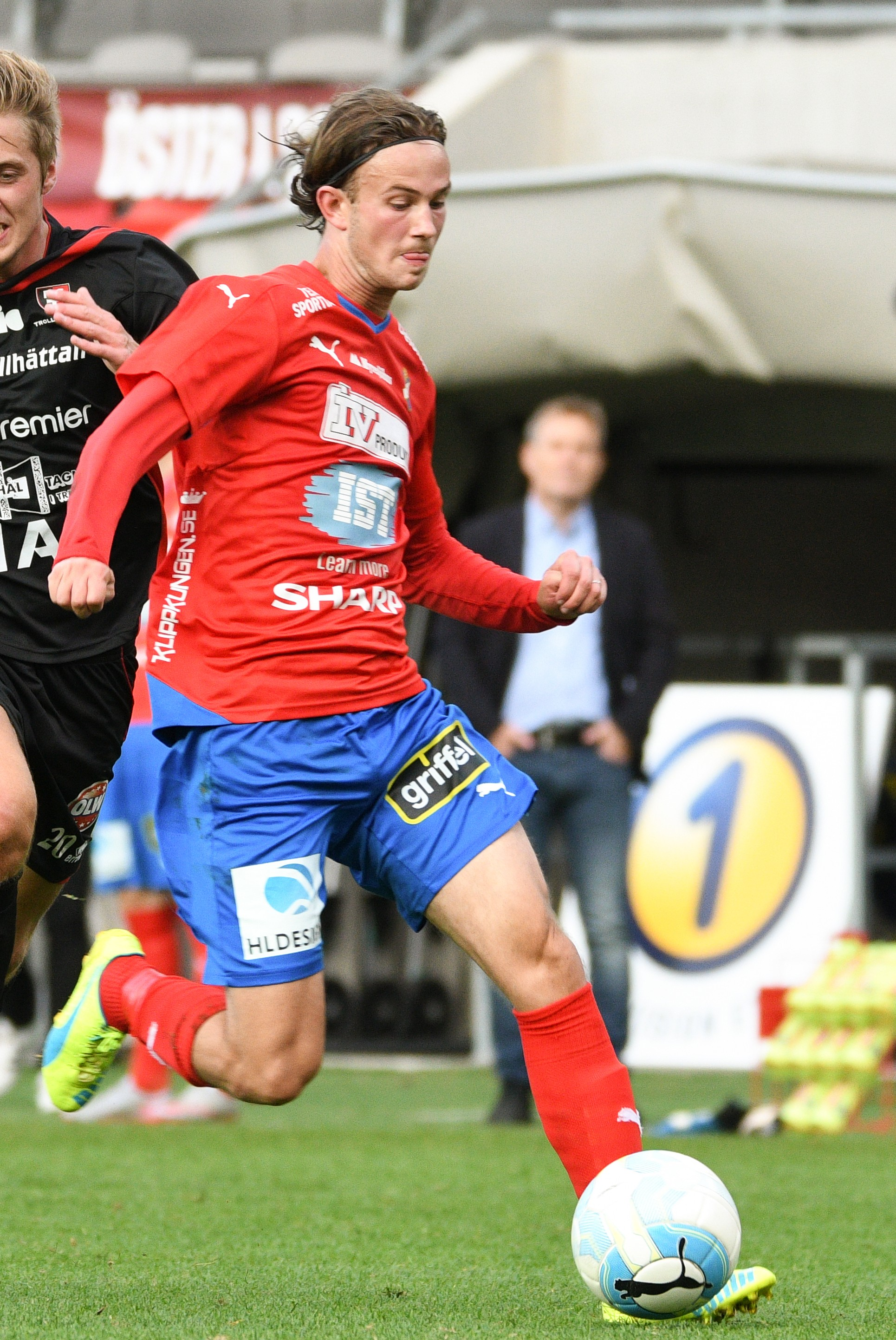 Svenske yttermittfältaren Robin Östlind med bollen för sitt Öster i 5-0 segern mot Trollhättan på Myresjöhus Arena i september 2016.